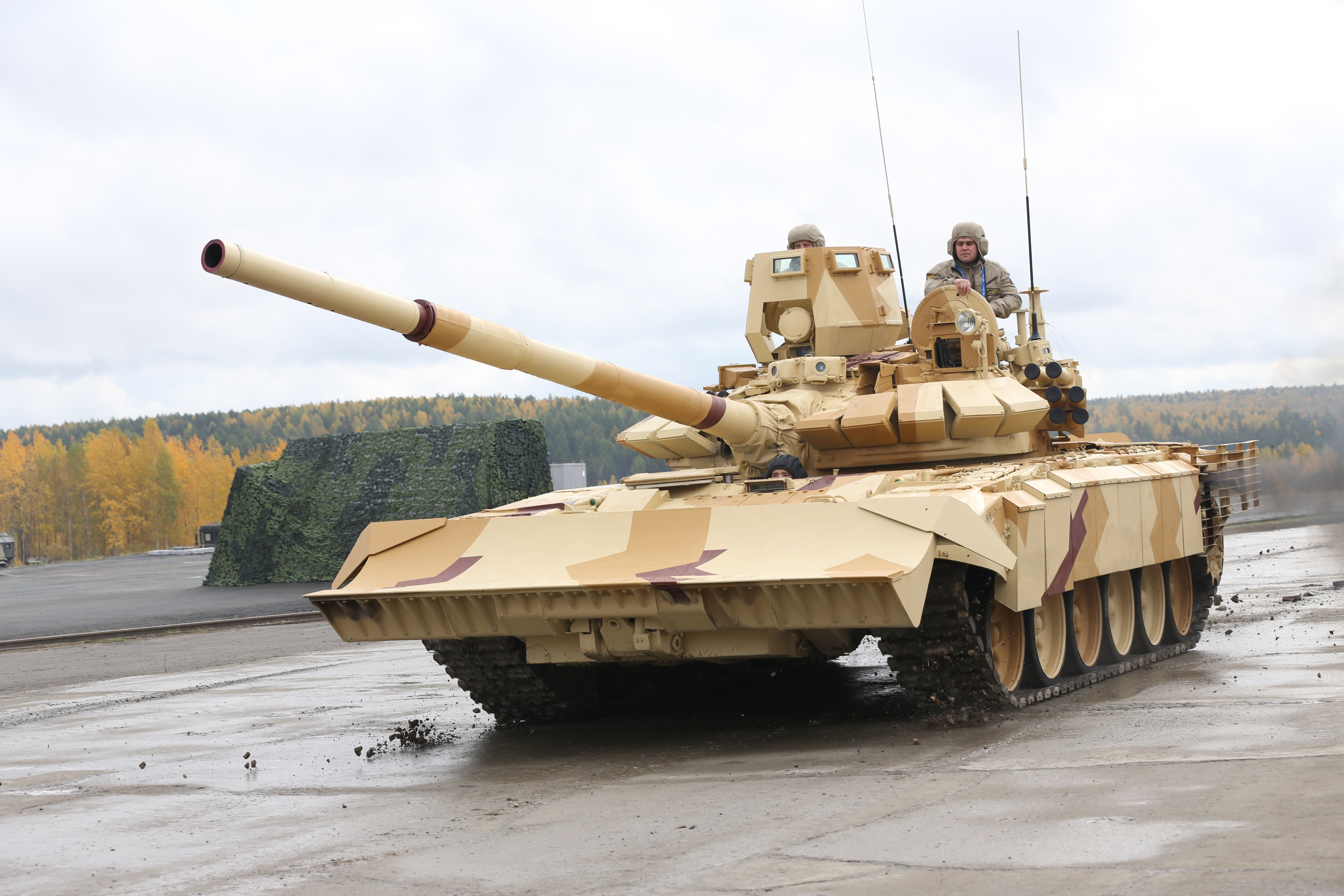 Модернизированный Т-72 с комплектом средств защиты для ведения боевых действий в городских условиях (Modified T-72 with additional protection kit for urban survival)